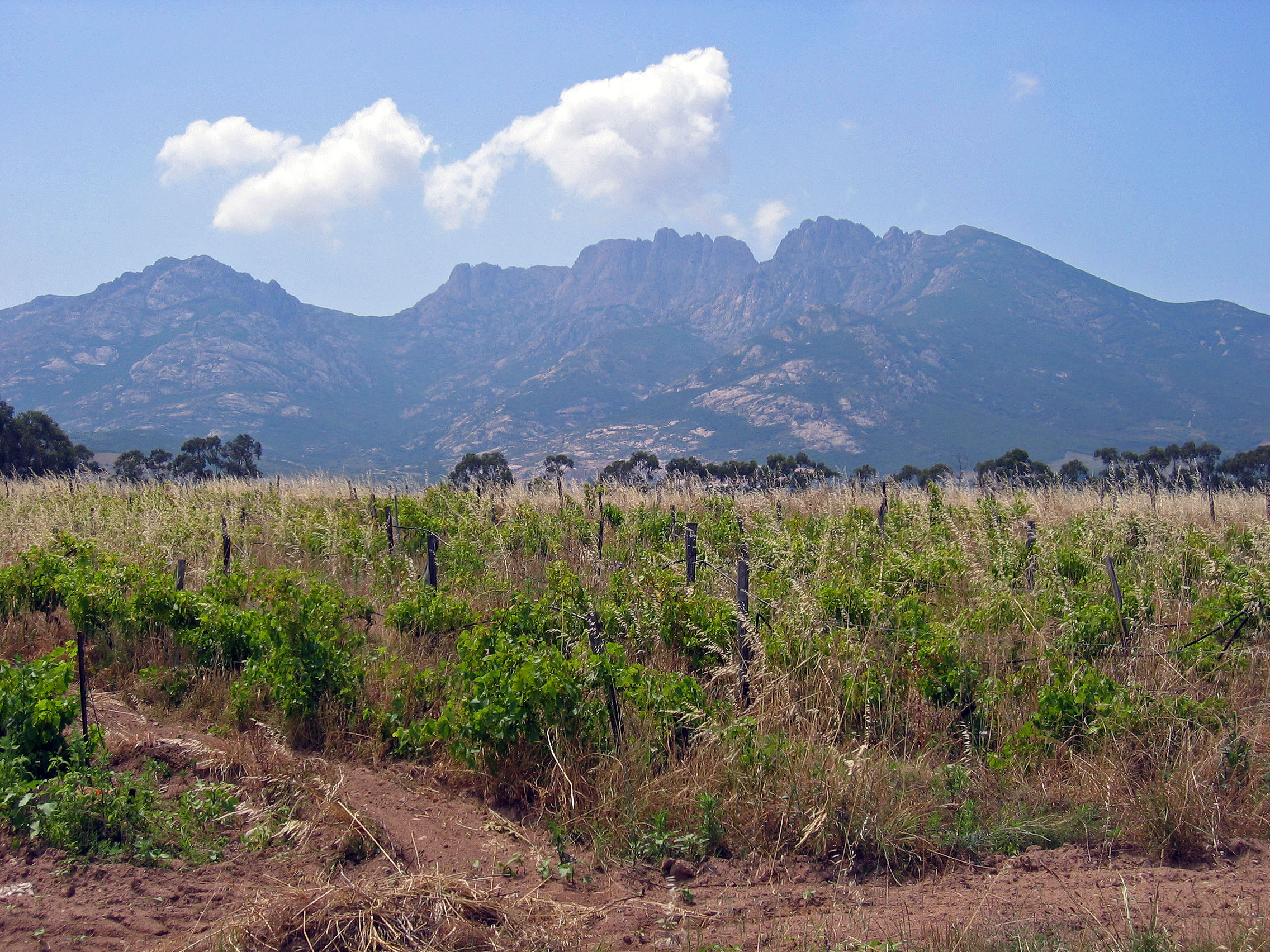 Wine, Domaine De La Figarella, Near Calvi, France